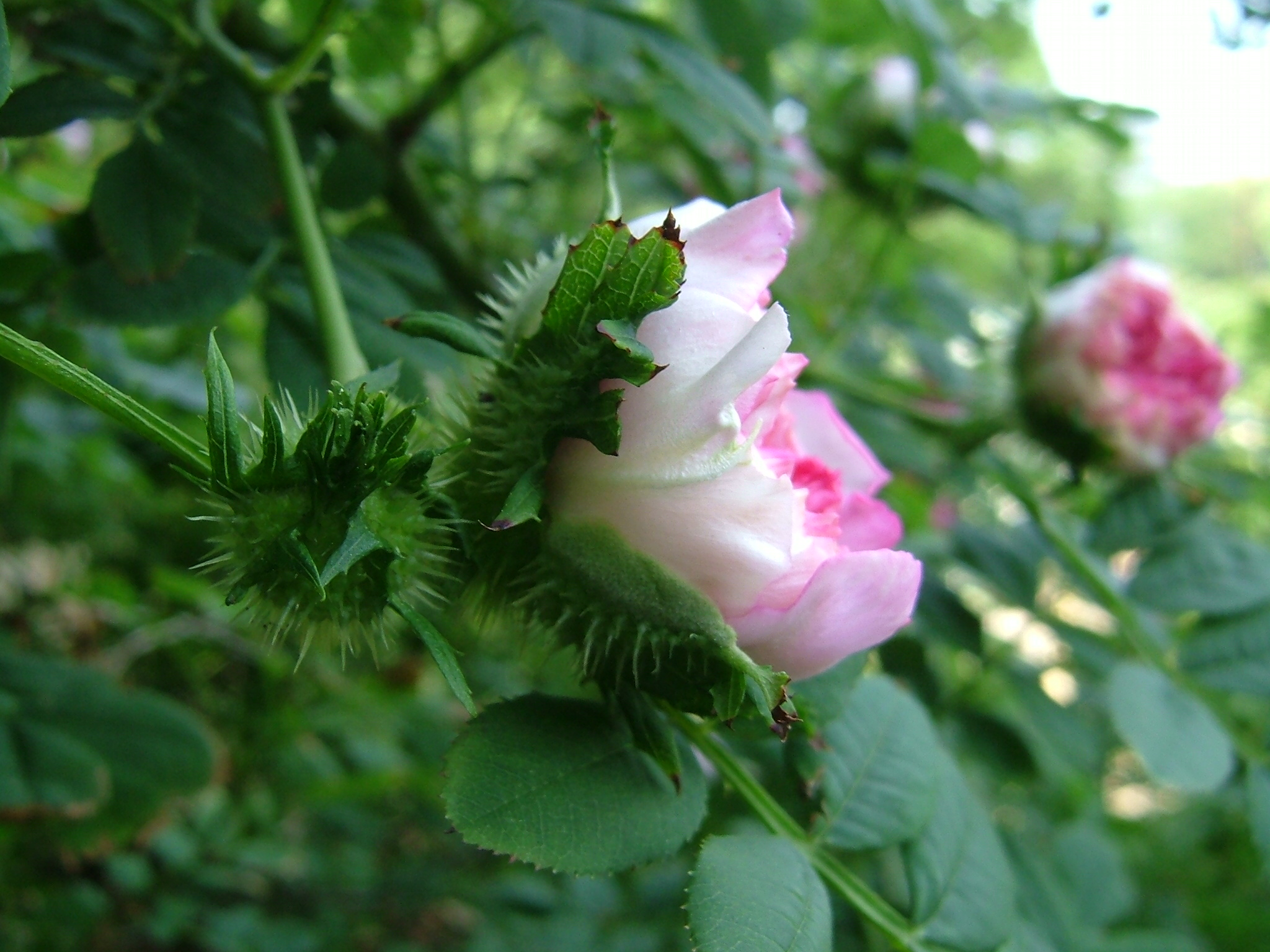 ロサ ロクスブルギー（イザヨイバラ）靱公園 Rosa roxburghii